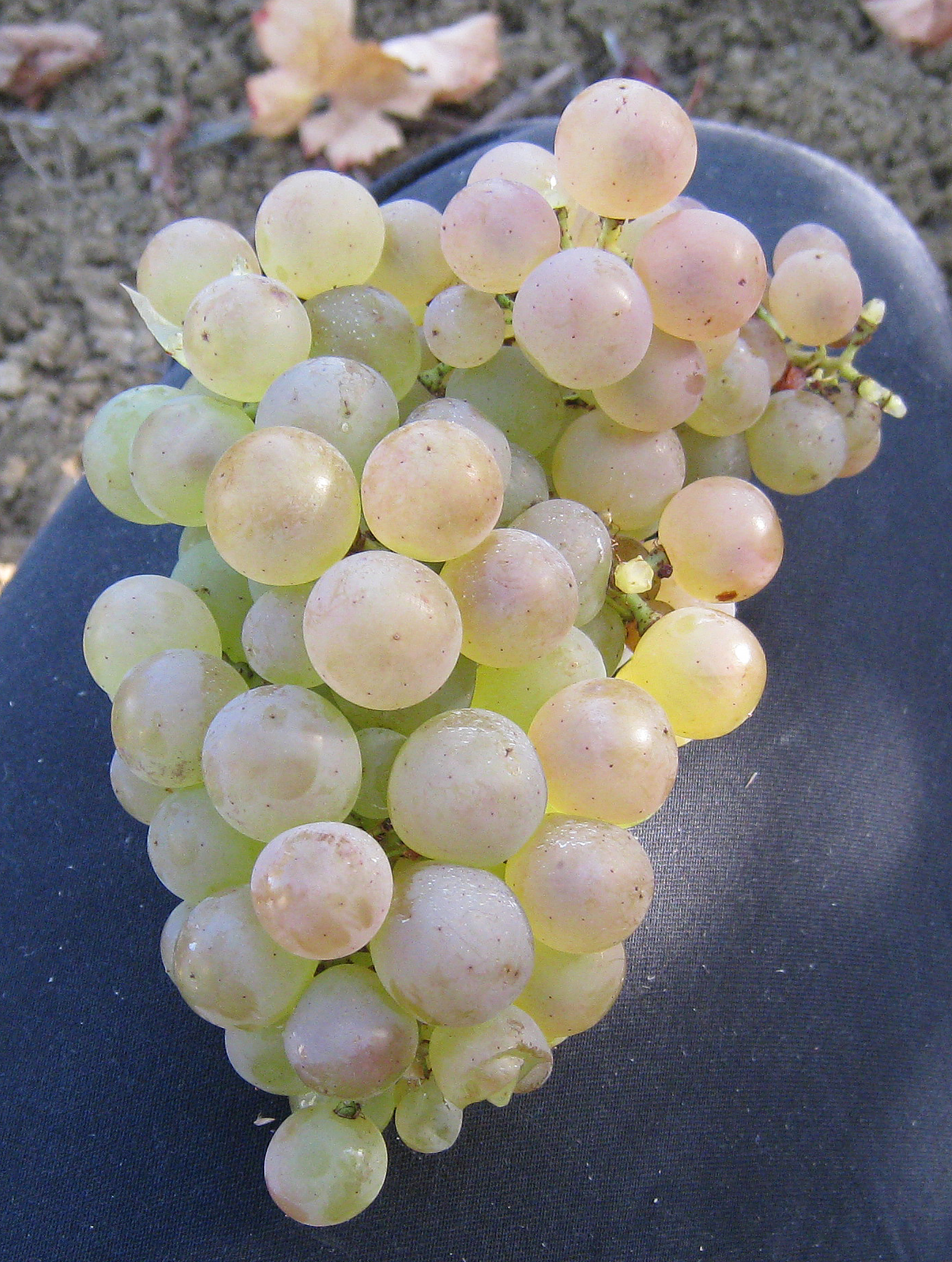 Grappe de mauzac blanc dans le domaine de Plageoles à Gaillac